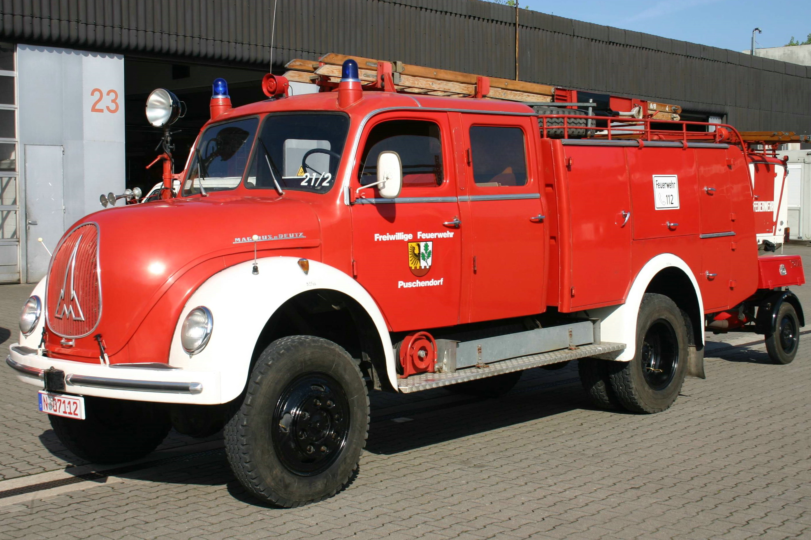 Tanklöschfahrzeug TLF 16 (ehemals Freiwillige Feuerwehr Puschendorf)